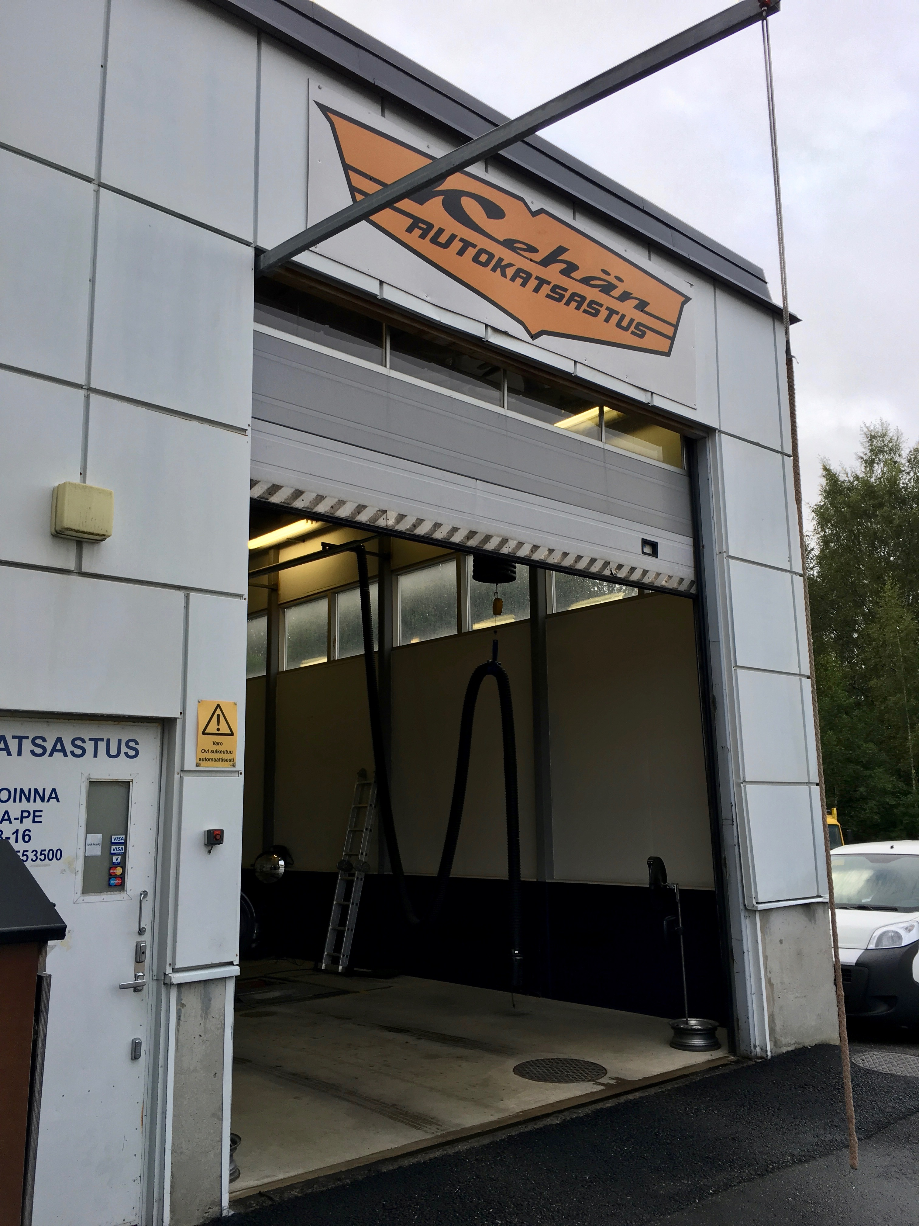 Kehän autokatsastusasema Helsingin Konalassa.